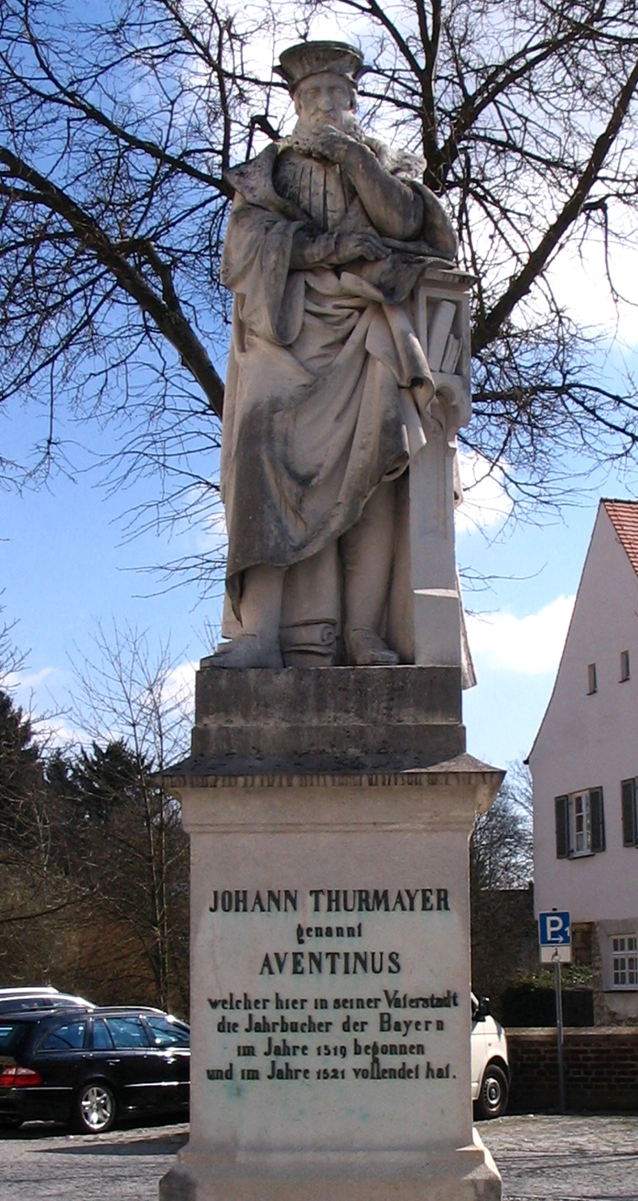 Stadt Abensberg, Landkreis Kelheim Niederbayern: Das in seiner Geburtsstadt im Jahre 1861 errichtete Aventinus-Denkmal